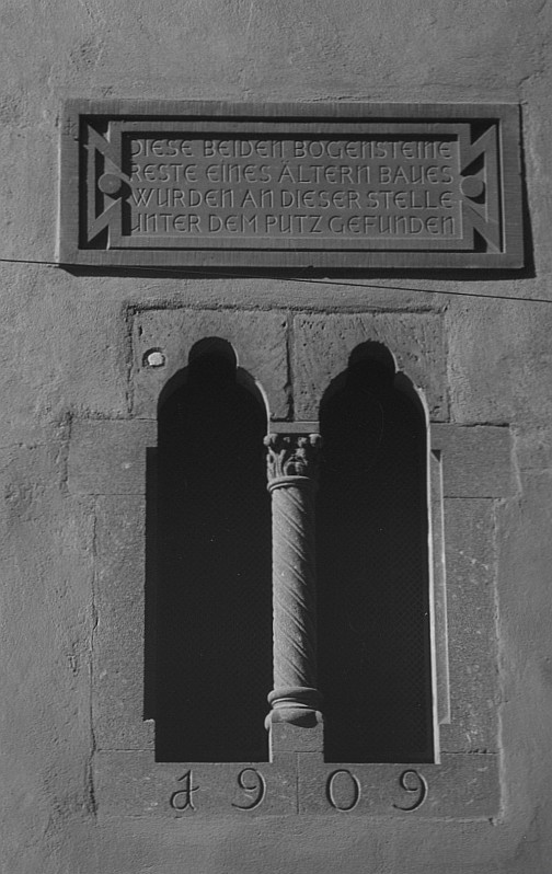 Original image description from the Deutsche FotothekBogensteine des Alten Rathaus